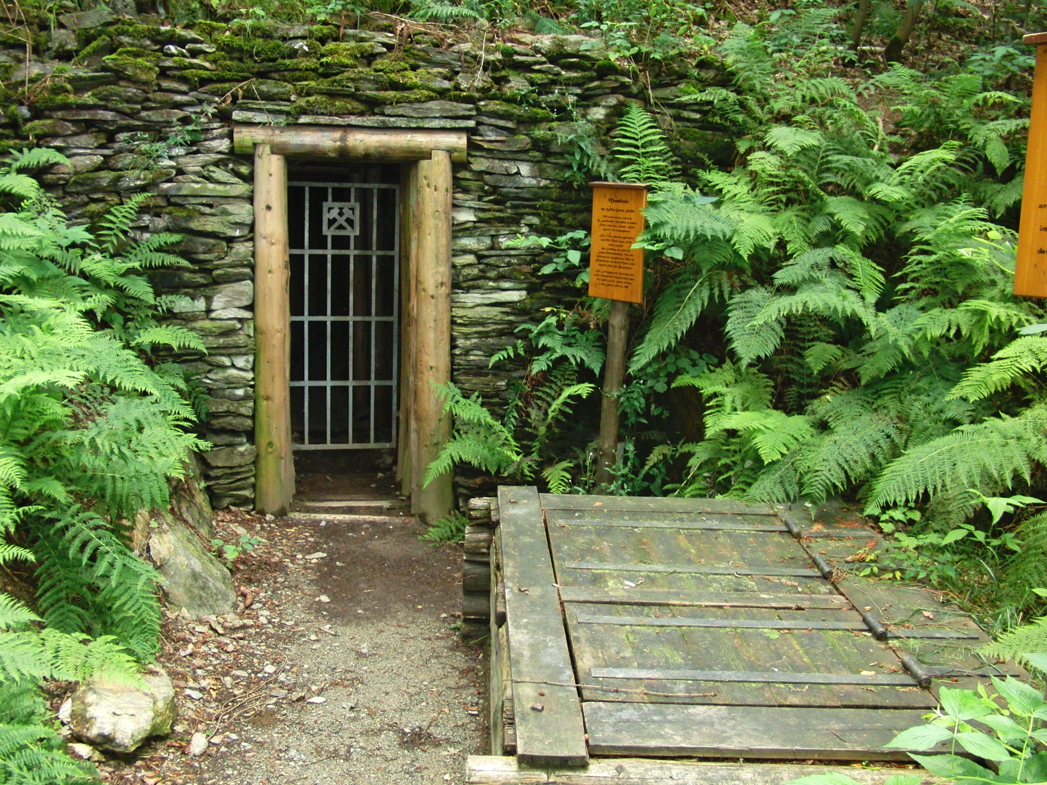 Bergwerk Wille Gottes